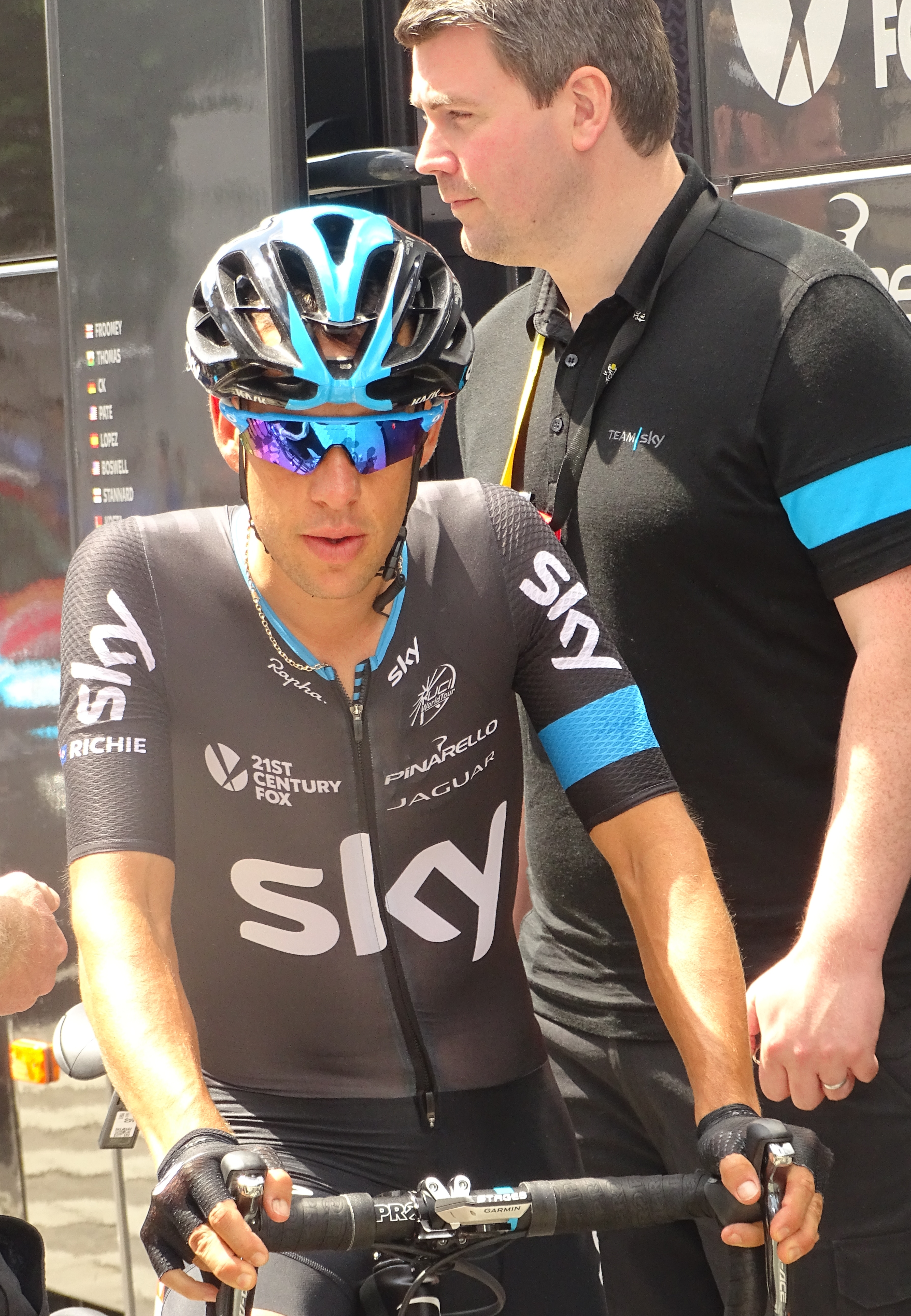 Reportage réalisé le lundi 6 juillet à l'occasion du départ de la troisième étape du Tour de France 2015 à Anvers, Belgique.